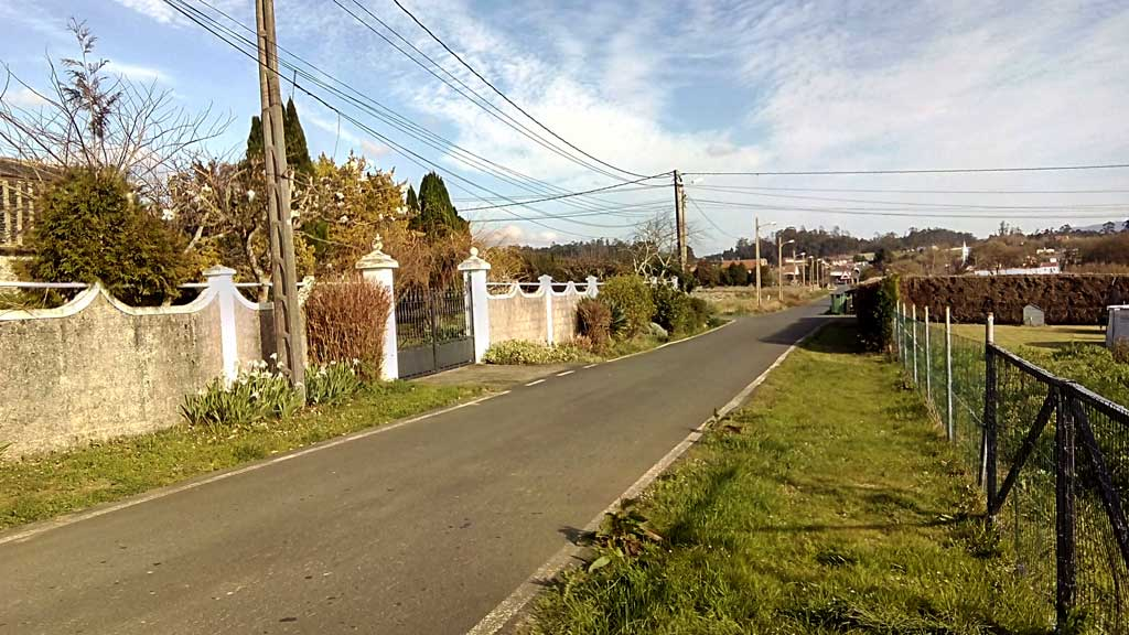 Vista de Fernade, Castro, Narón.